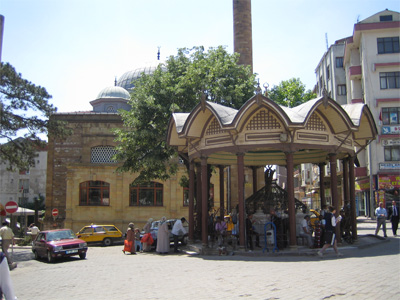 kendi resmimdir - Biga, Çanakkale , Hükümet meydanı